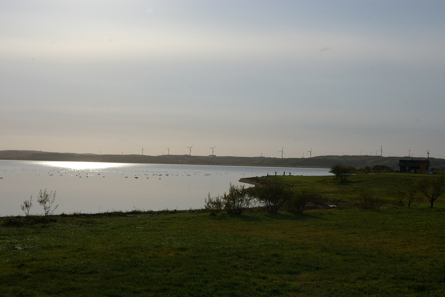 Oonuma swamp,Wakkanai city Hokkaido.